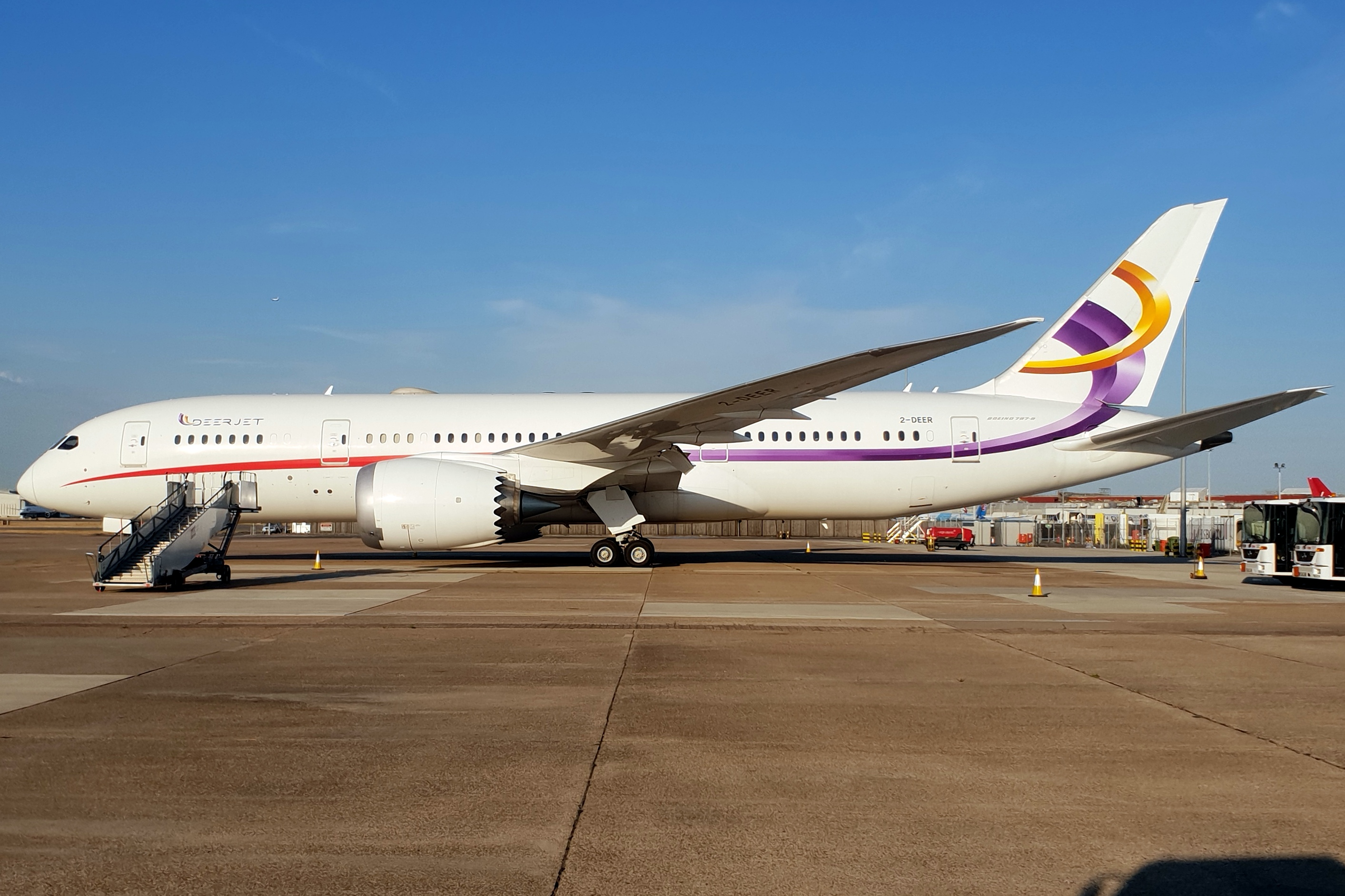 2-DEER 03072018LHR